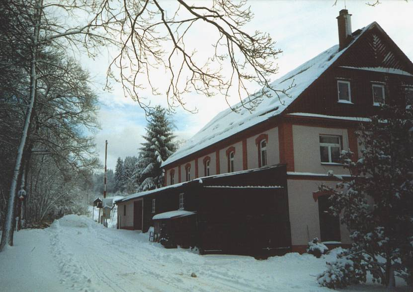 Grenzübergang an der Böhmischen Mühle selbst fotografiert Ende Dezember 2003